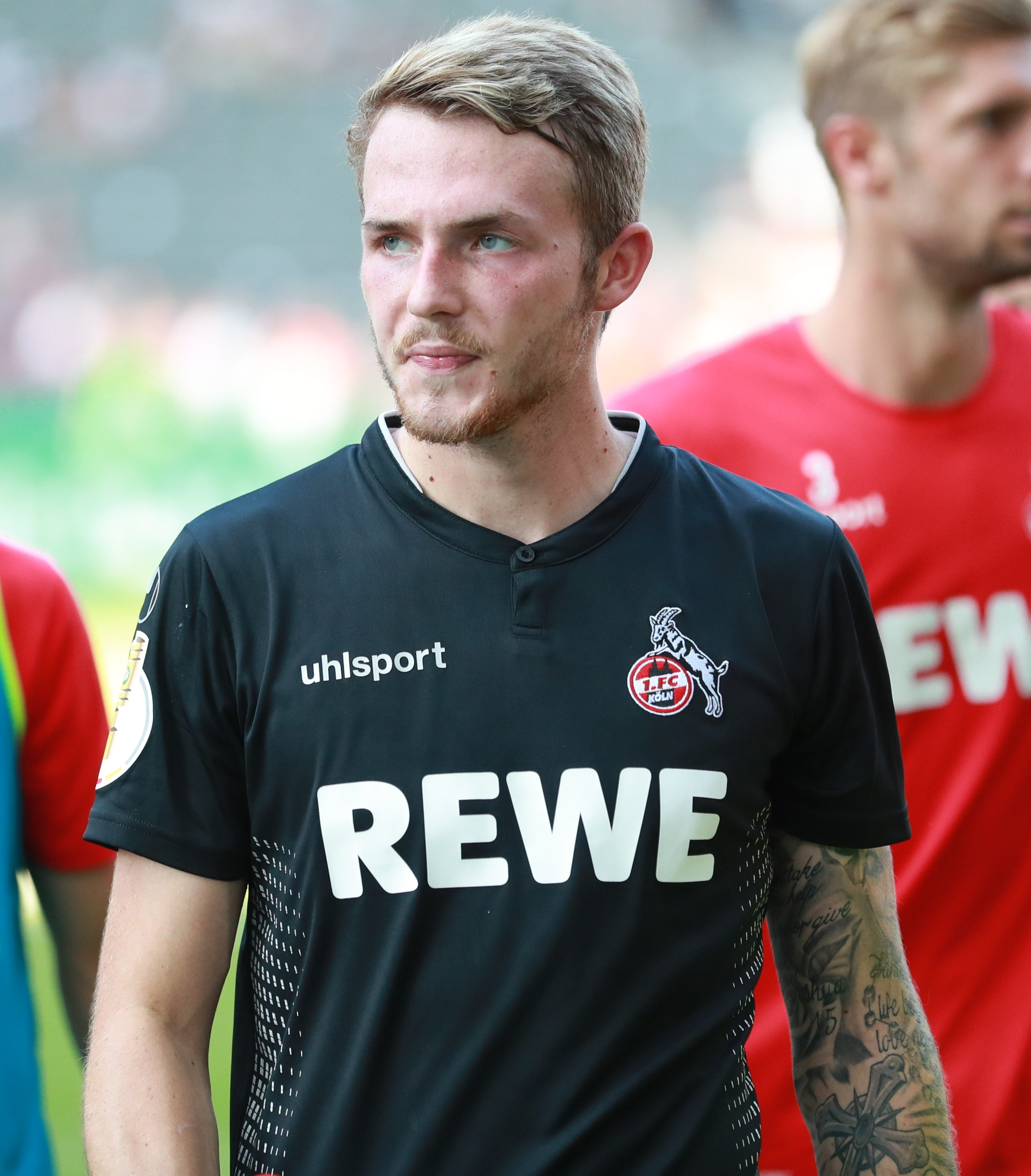 DFB-Pokal 2018/19, 1. Hauptrunde: BFC Dynamo gegen 1. FC Köln 1:9 (1:4): Jannes Horn